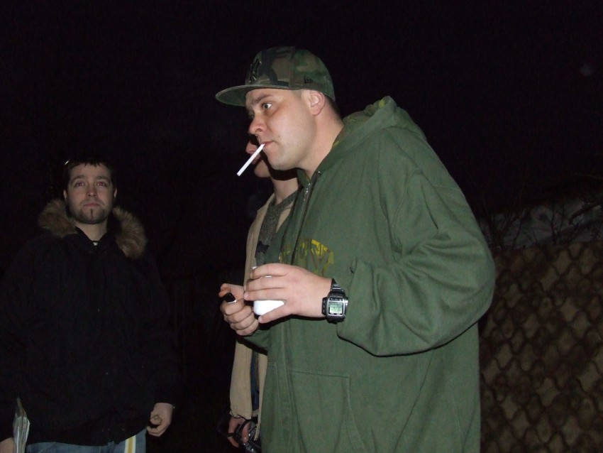 Jacek Tede Graniecki-Przy kręceniu wideoklipu do jego czwartej płyty Esende Mylffon "Glokk", 2006